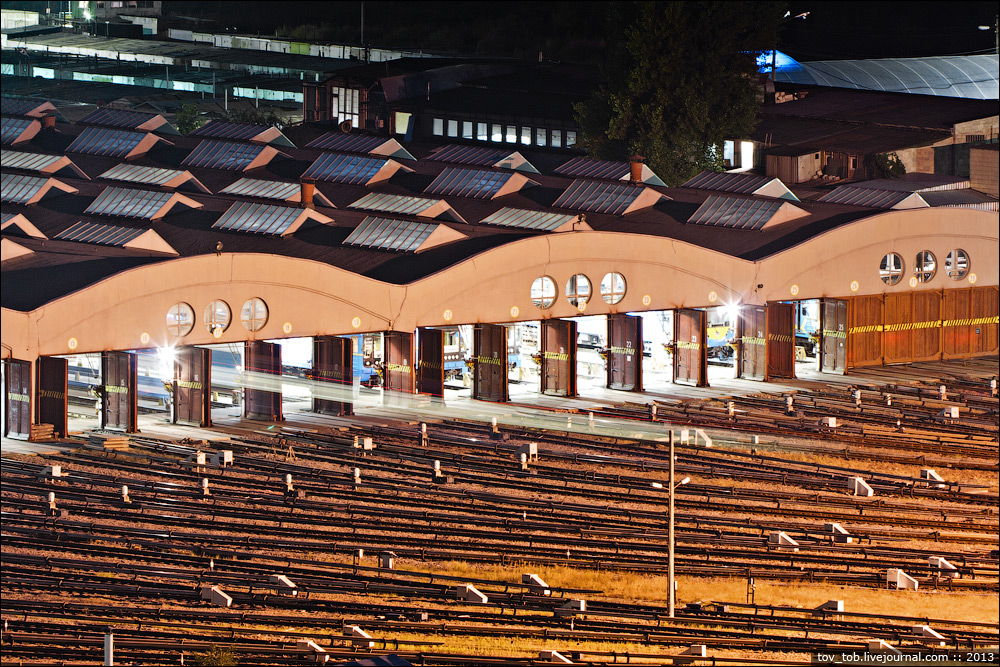 Депо Оболонь Киевского метрополитена.